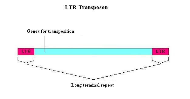 Retrotransposon